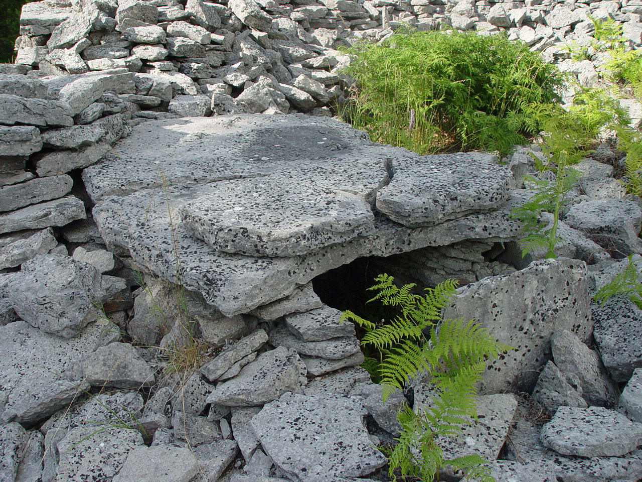 Gotland, Hügelgrab Kauparve (Ort:Gemeinde Lärbro). Einstige Höhe ca. 3m, Durchmesser 18m. Eingang zur Grabkammer